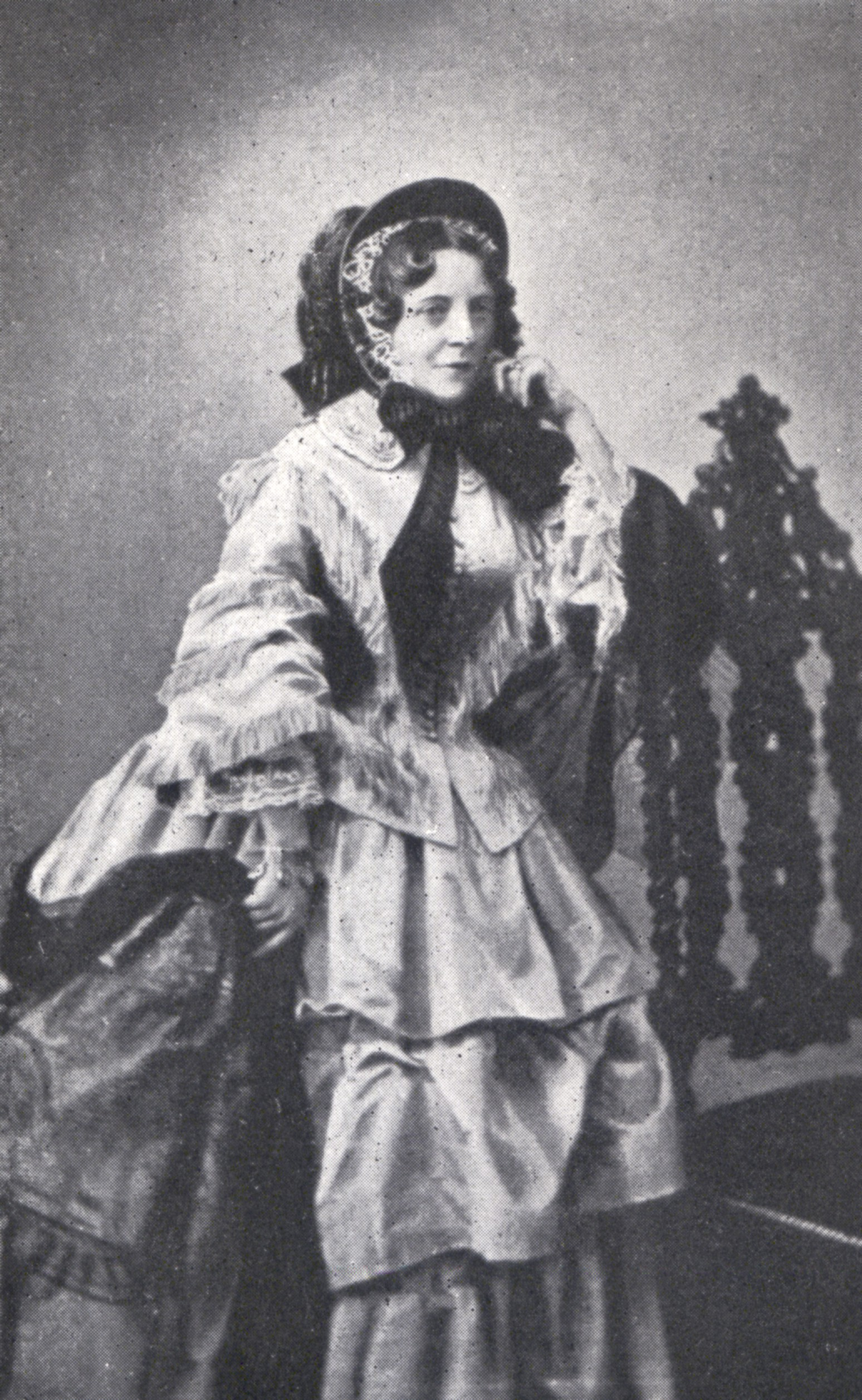 Foto der Schauspielerin Pauline Virginie Déjazet